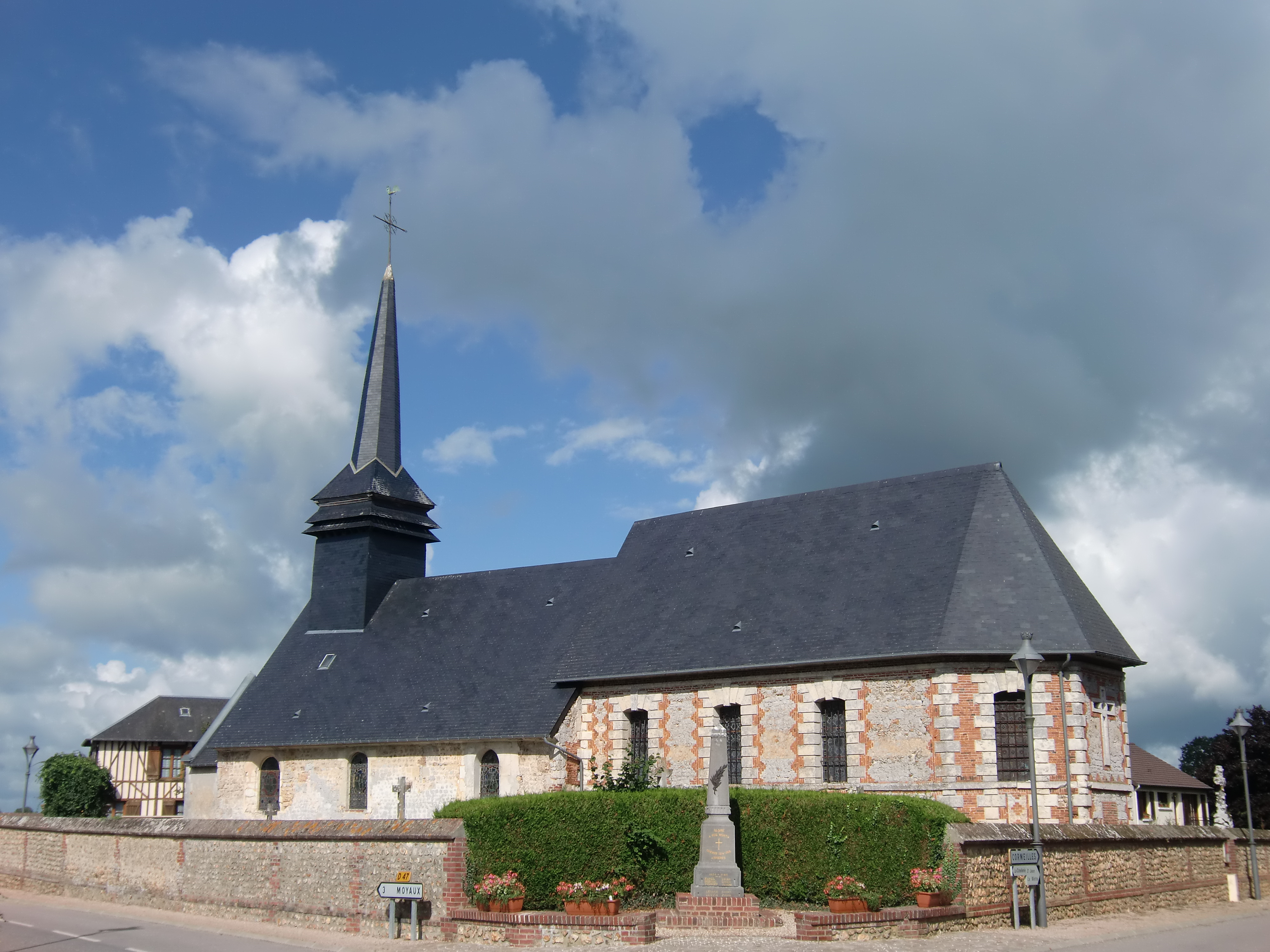 église Saint-Gervais d'Asnières (Eure, Normandie, France)